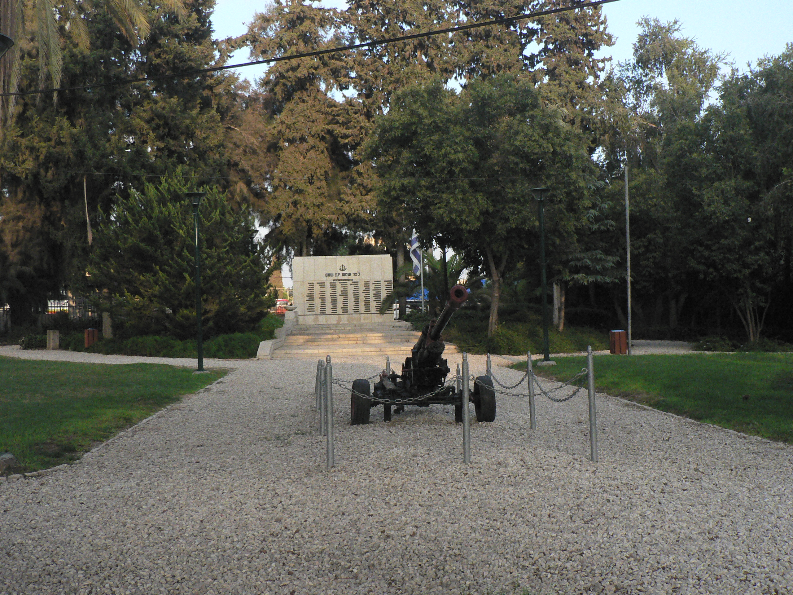 Ness Ziona נס ציונה Hero's Garden גן גיבורים